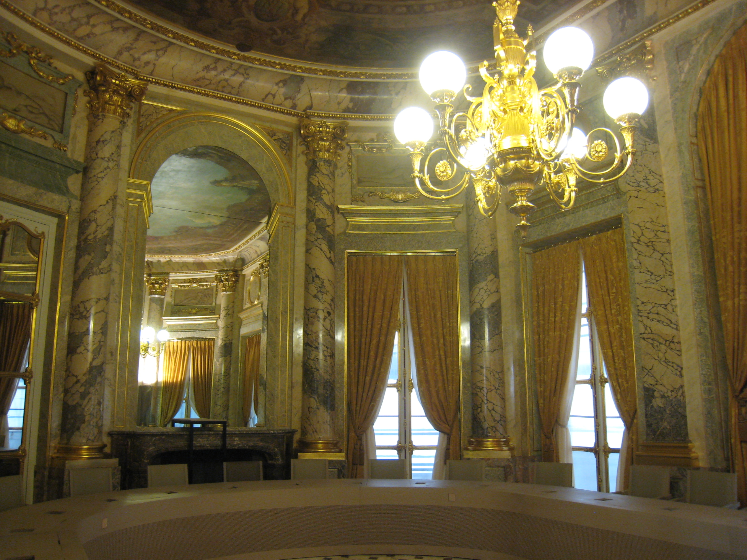 Salle du tribunal des conflits au Palais Royal (Paris, France).